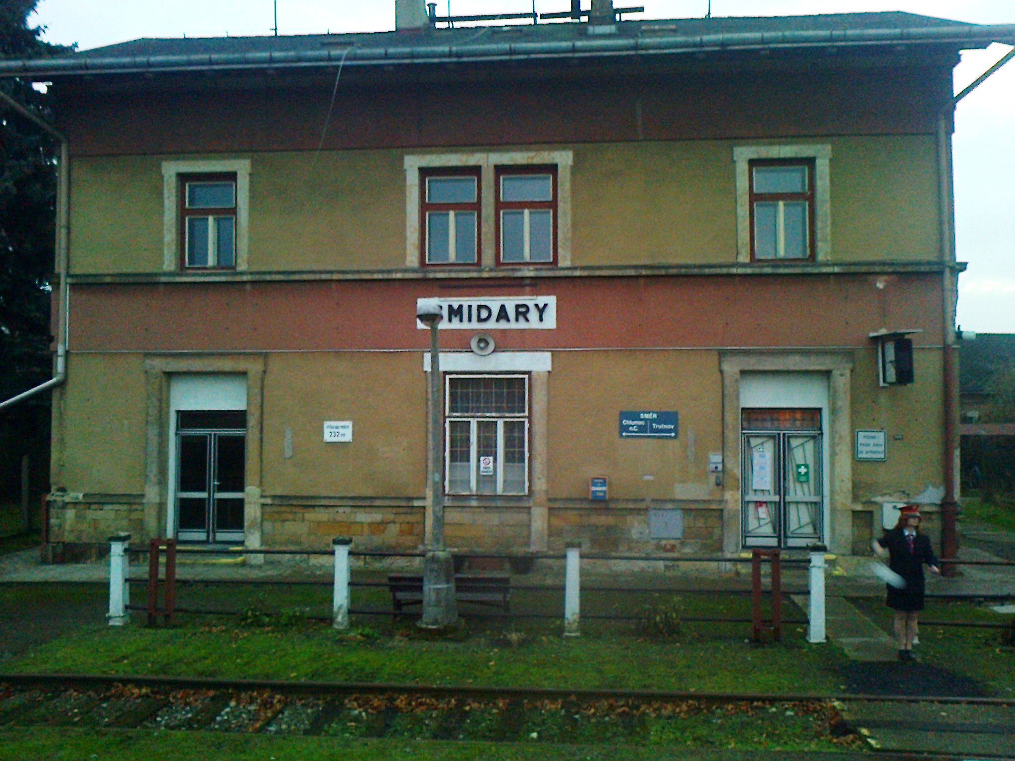 Smidary, okres Hradec Králové, nádraží.